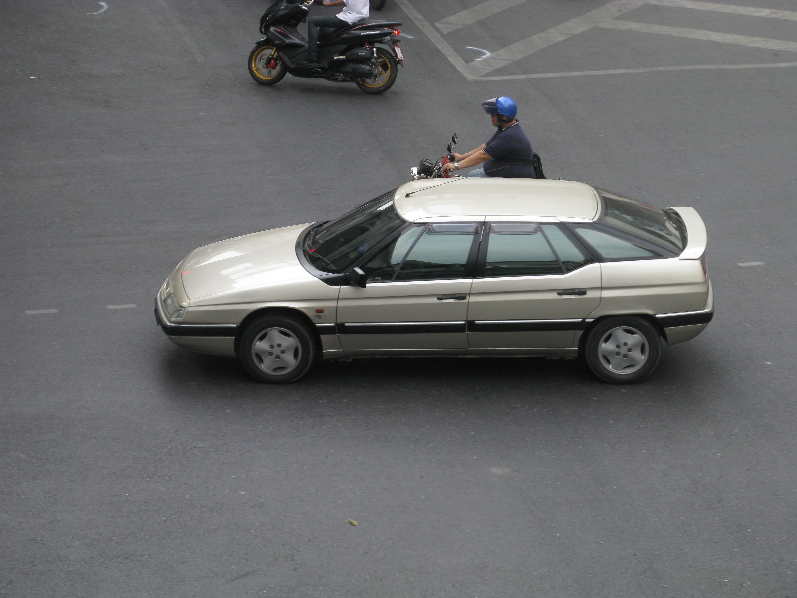 Citroen XM V6